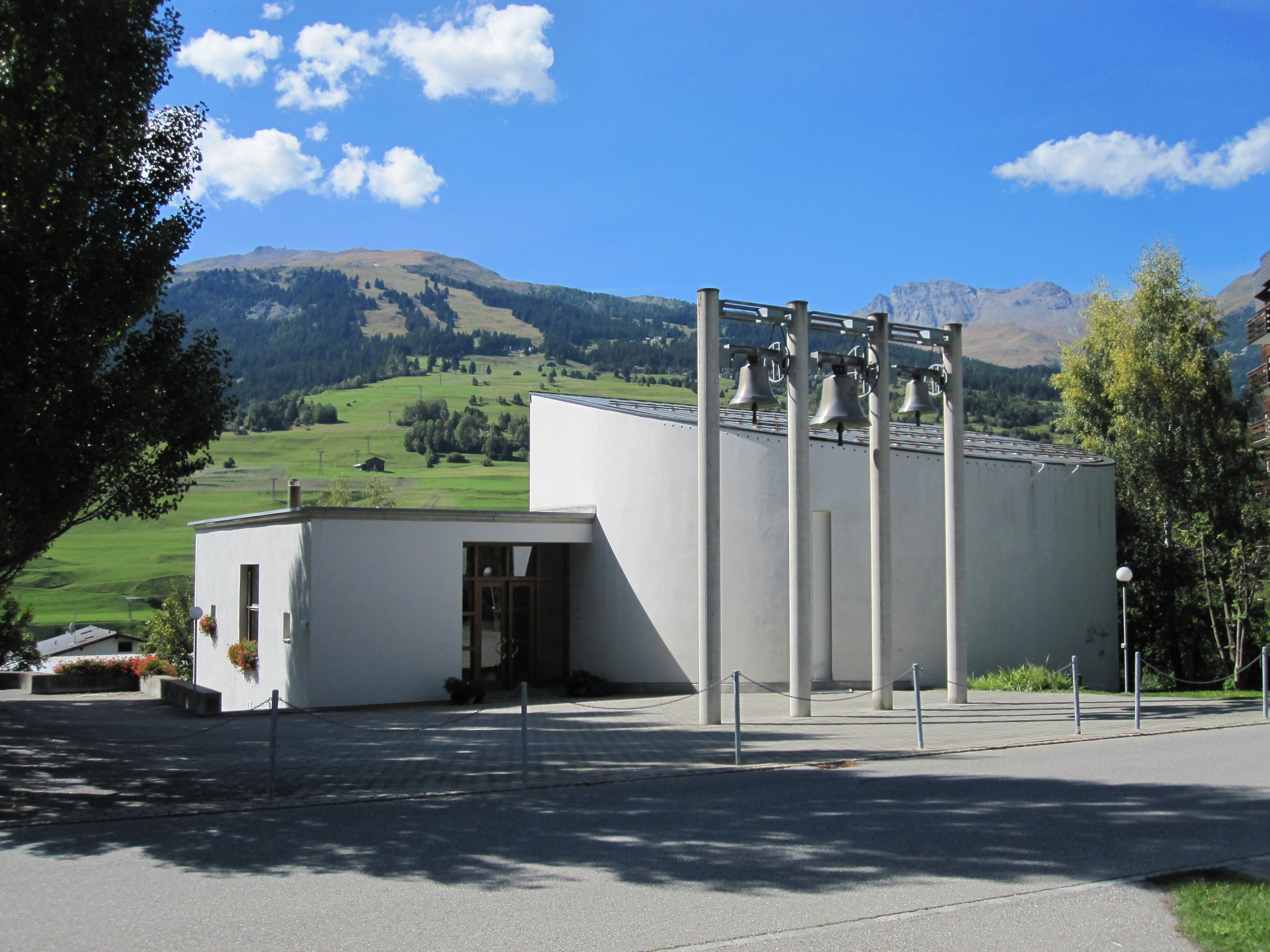 reformierte Kirche in Savognin (Kanton Graubünden)Rumantsch: Baselgia reformada Savognin (cantung Grischun)